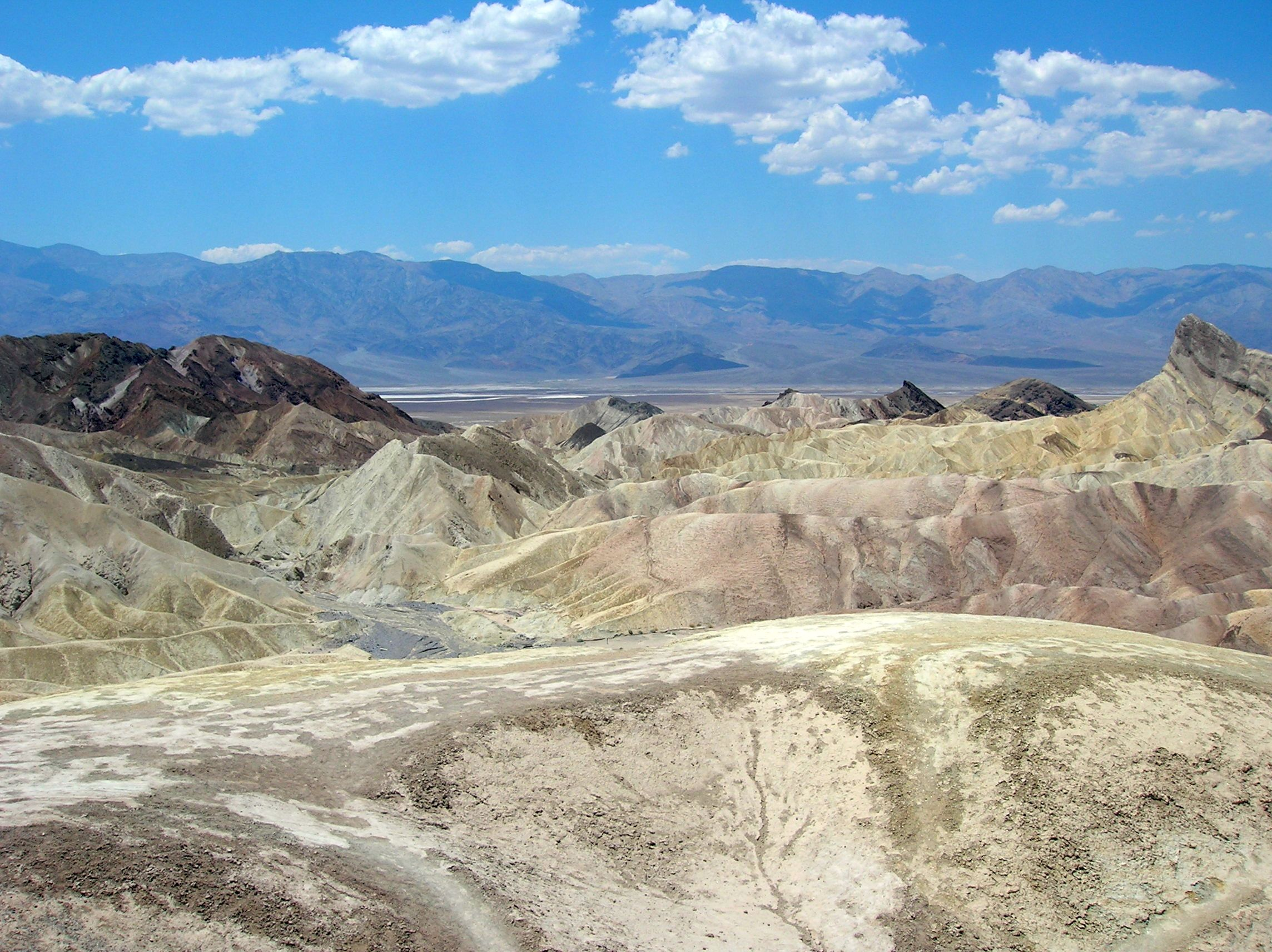 Widok z Zabriske Point